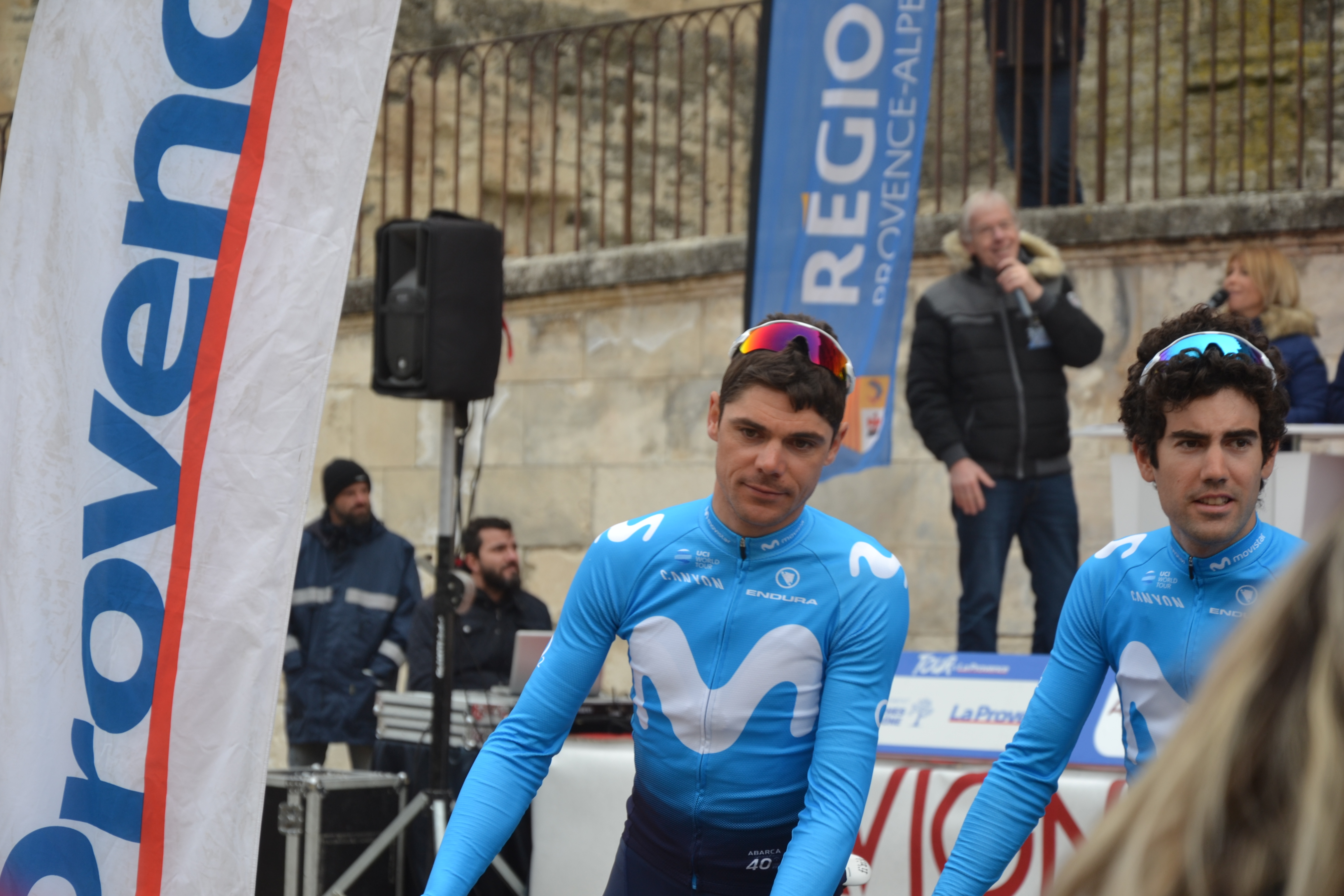 Lors du podium des signatures avant départ de l'étape